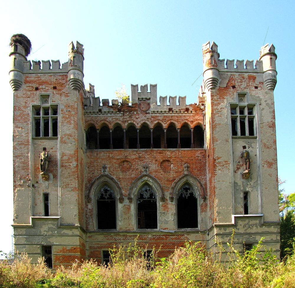 Pałac z XVII wieku w ruinie